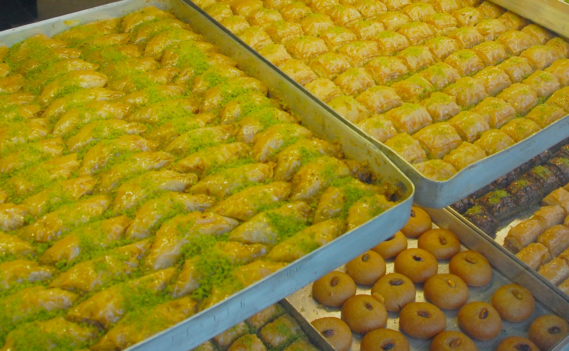 Tepsilere dizilmiş Türk tatlıları: Baklava, şekerpare ve şöbiyet.